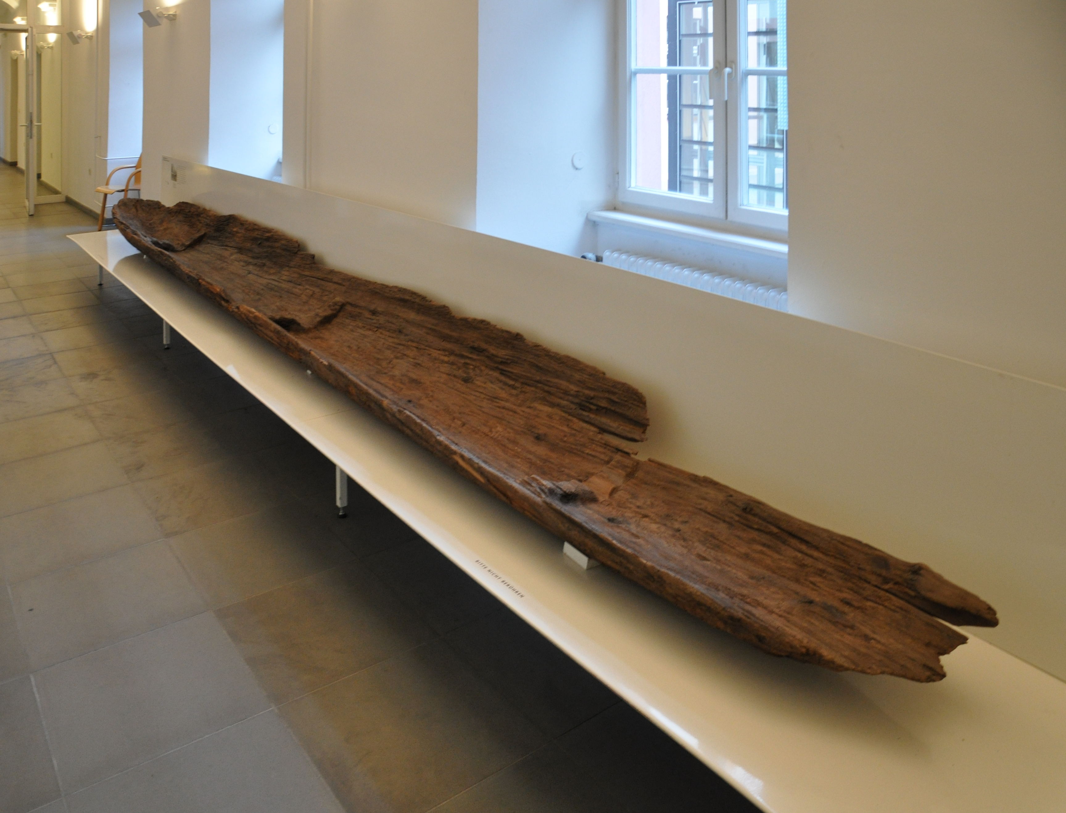 Archäologisches Landesmuseum Baden-Württemberg, frühmittelalterlicher Einbaum aus dem Hochschwarzwald, zwischen 650 und 725 n. Chr., gefunden 1928 am Südostende des Schluchsees